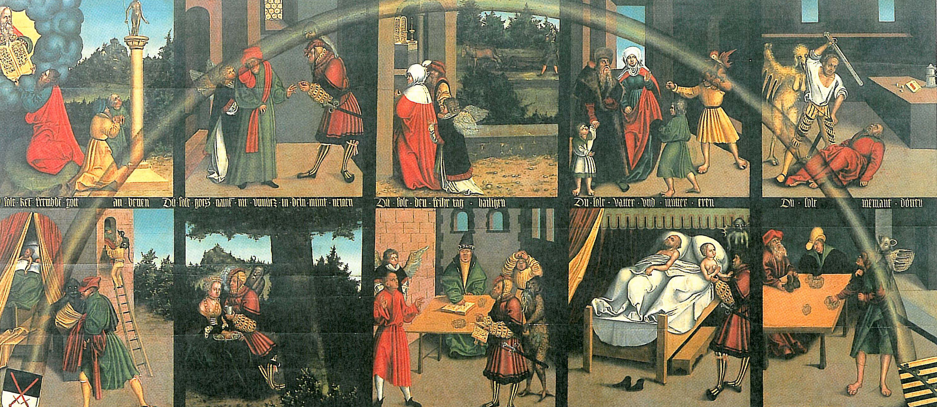 sächsische Wappen in den unteren Ecken